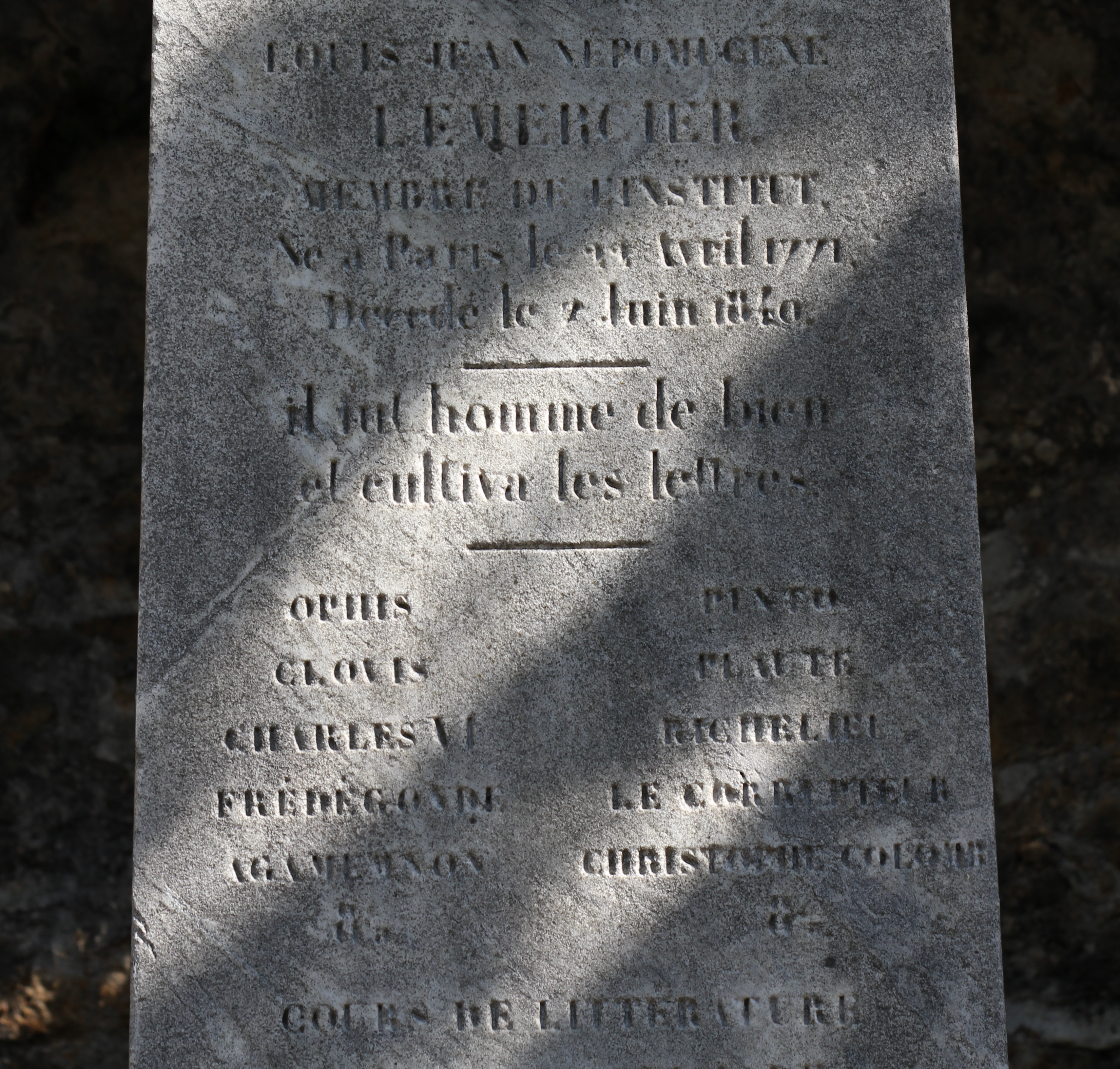 Obélisque ornée d'un médaillon en marbre blanc signé P.-J. David d'Angers, 1840.